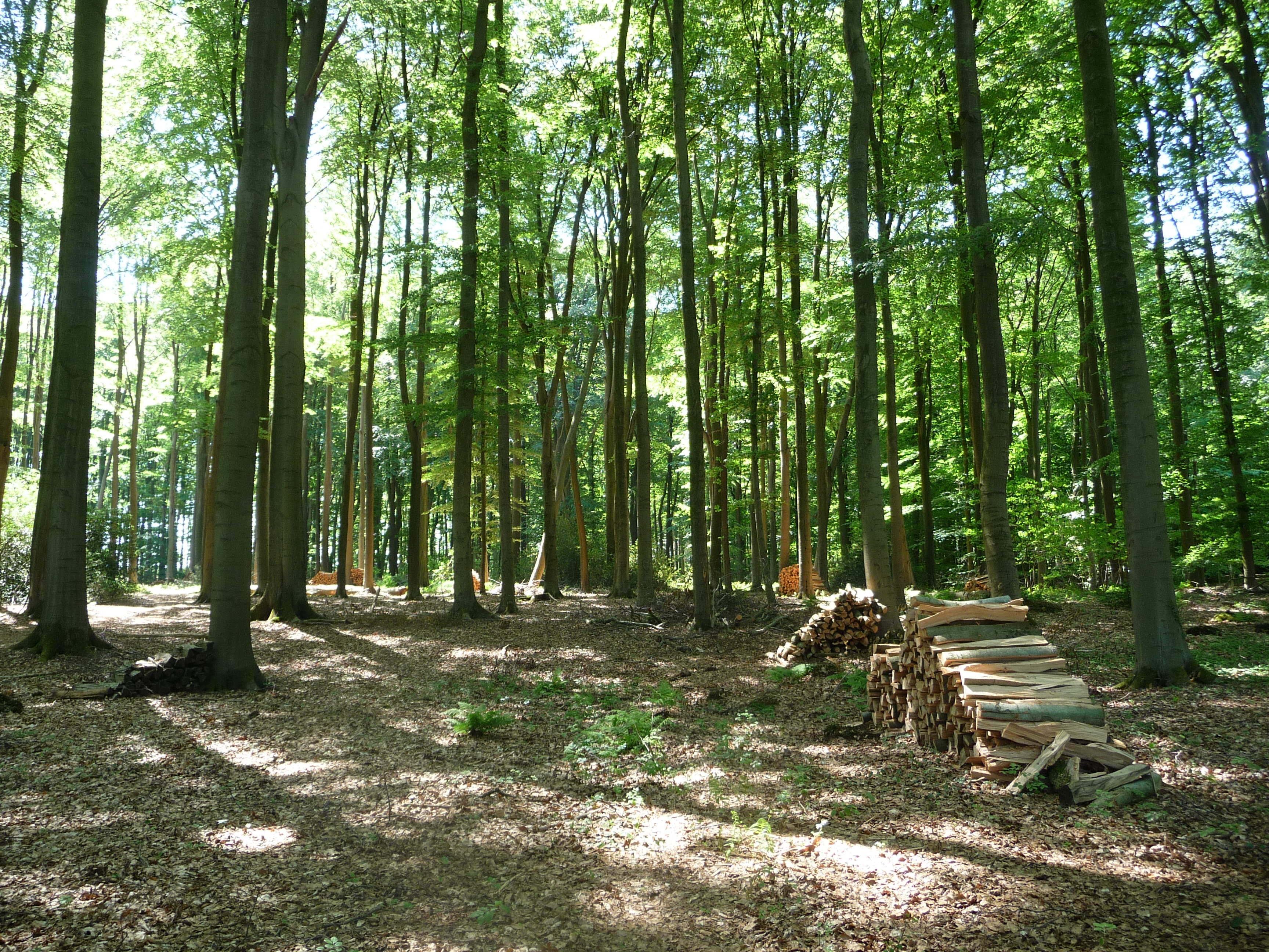 Hier handelt es sich um ein mehrteiliges Landschaftsschutzgebiet (Wald) um Sondermühlen.